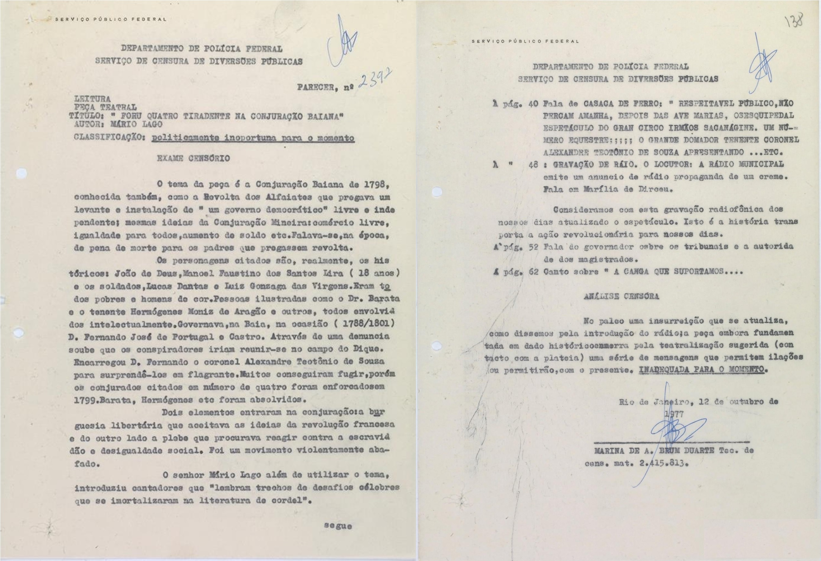 Parecer da censura avaliando a peça "Foru 4 Tiradentes na Conjuração Baiana", de Mario Lago.. Serviço de Censura e Diversões Públicas - SCDP